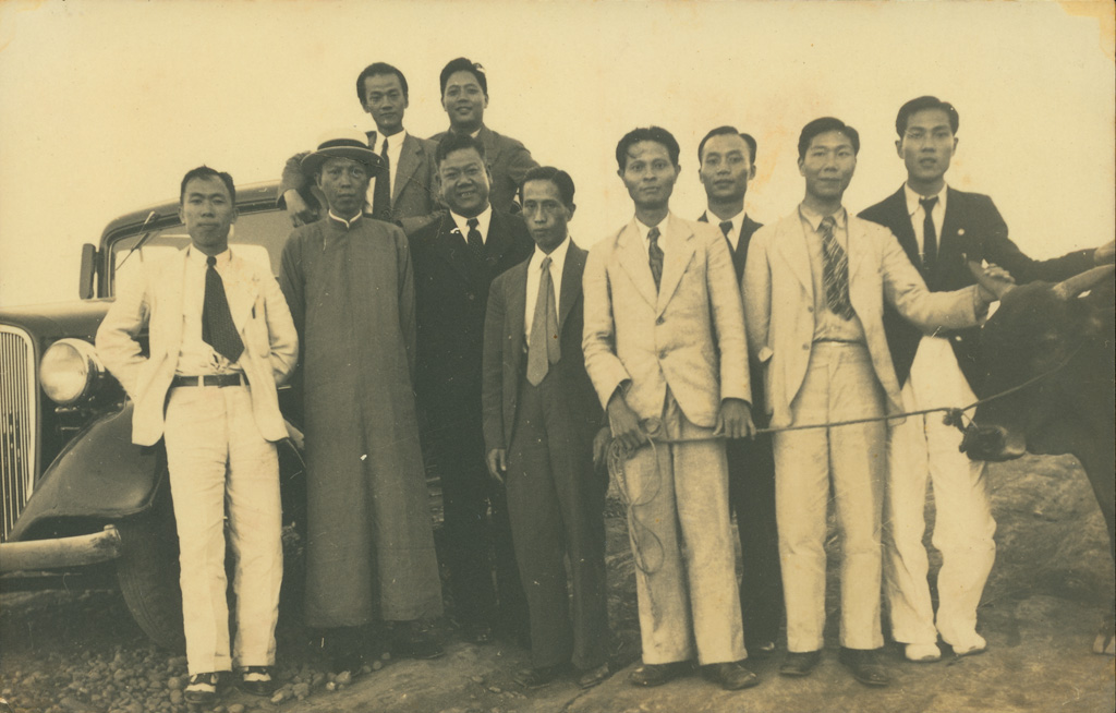 前排右起呂基正、洪瑞麟、陳德旺、陳澄波、李梅樹、楊肇嘉、（隔一人）張星建，後排左一李石樵、右一楊三郎。